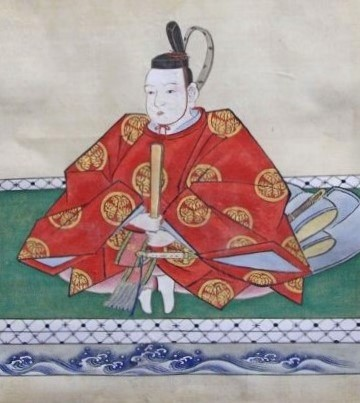 松平家治の肖像。